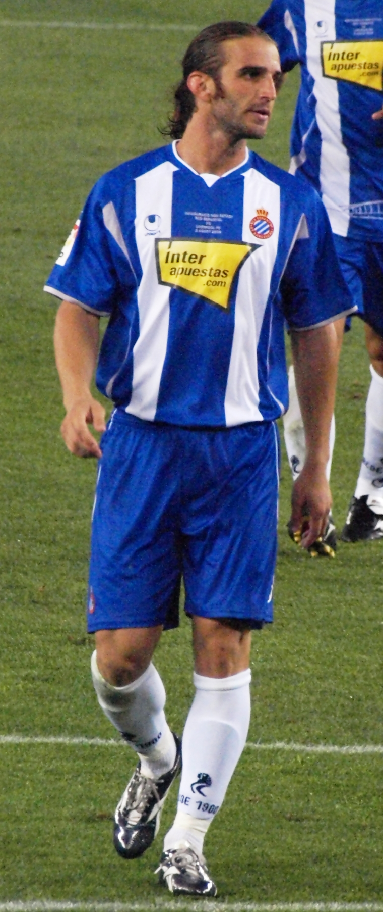 Iván Alonso del RCD Español en el encuentro que enfrentó a su club con el Liverpool FC, que sirvió para dar por inagurado oficialmente el Estadio de Cornellá-El Prat.